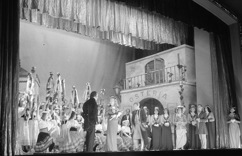 Original image description from the Deutsche Fotothek Szenenbilder mit Oda Troll als Anna Elisa und Emil Frickartz als Paganini